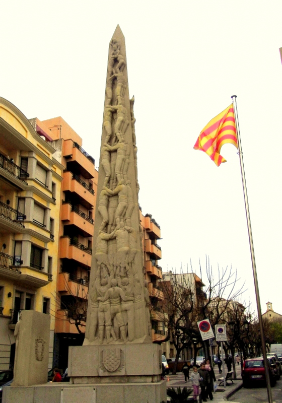 Monument als Xiquets de Valls